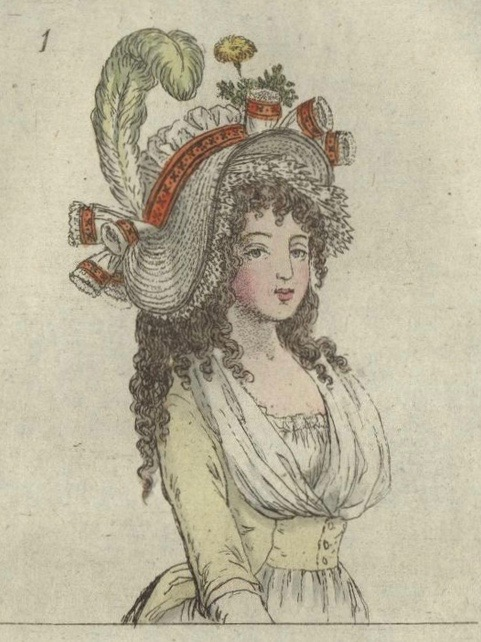 "Eine junge Genueser Dame in vollem Anzuge": Journal des Luxus und der Moden, hrsg. v. Friedrich Justin Bertuch u. Georg Melchior Kraus, Weimar, Jg. 10, Dez. 1795, Tafel 35 (Ausschnitt), vgl. Beschreibung S. 600 f.